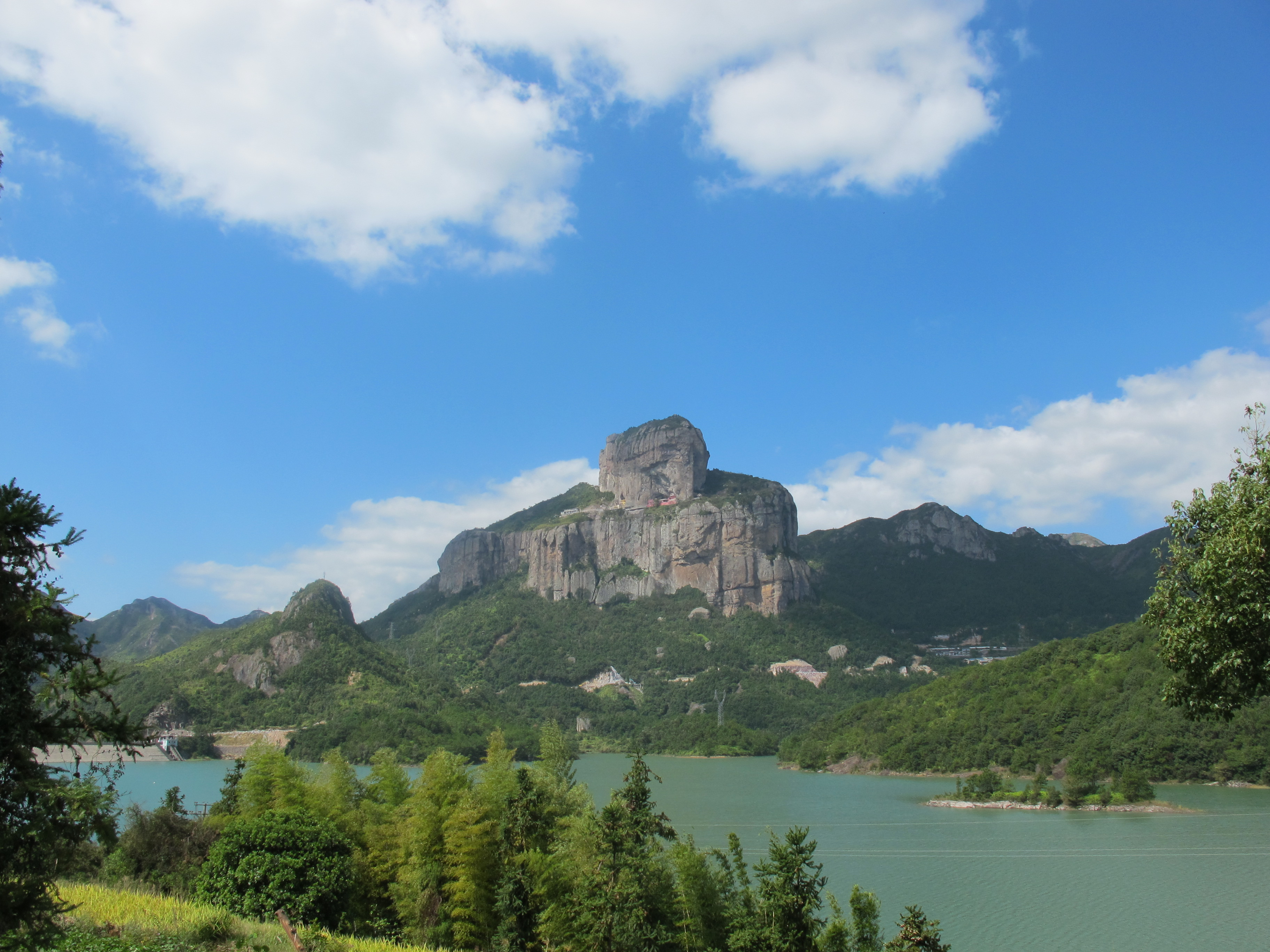 玉甑峰全貌